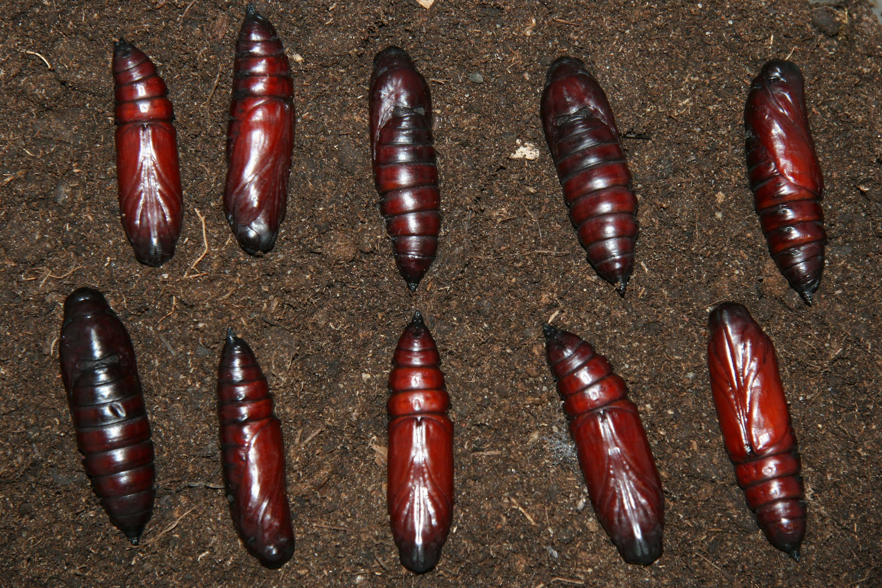 Acherontia atropos